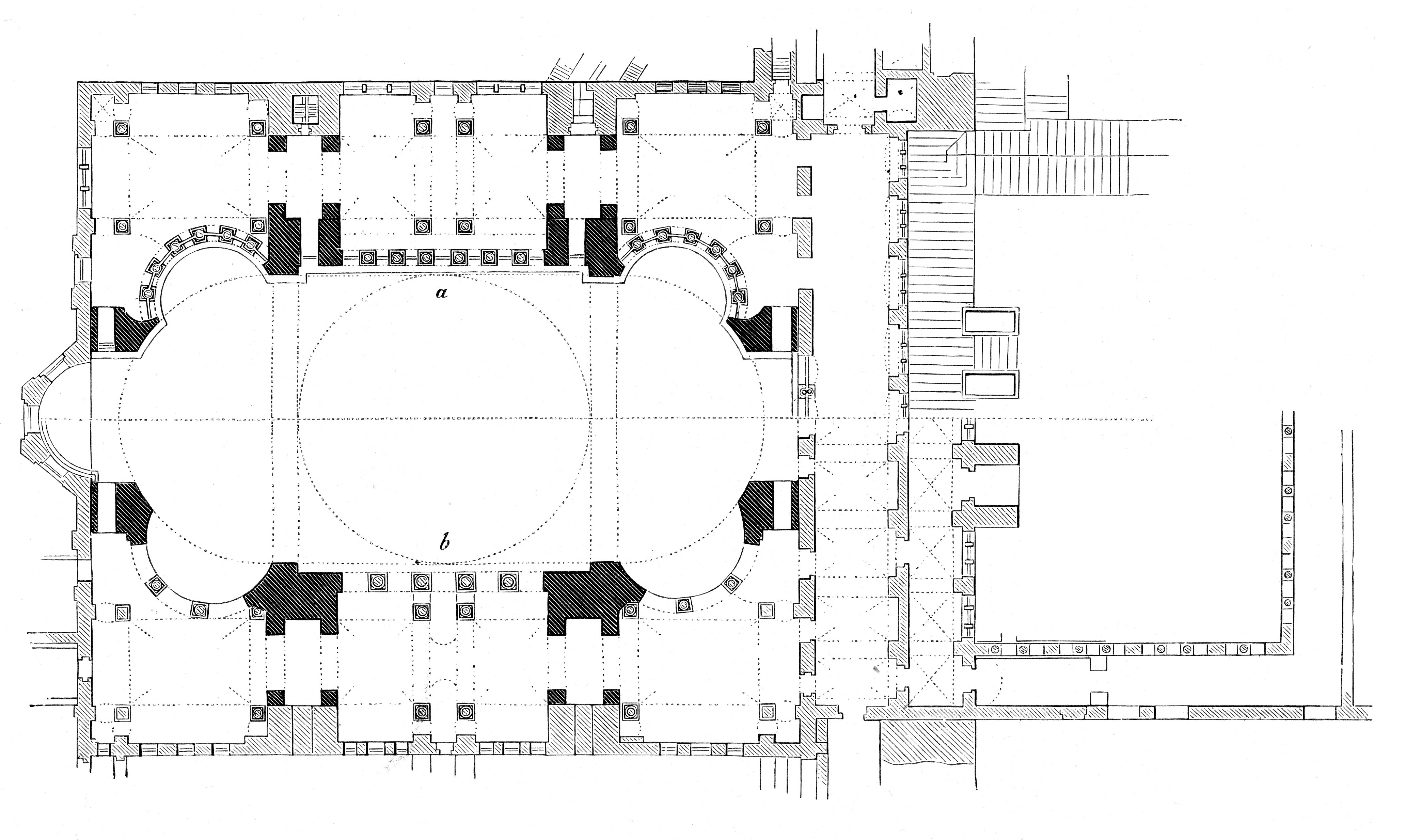 Plan de la basilique Sainte-Sophie de Constantinople sur deux niveaux, du temps de Justinien. (fichier créé à partir d'une modification du fichier "Hagia-Sophia-Grundriss.jpg" : ajout de deux lignes manquantes).